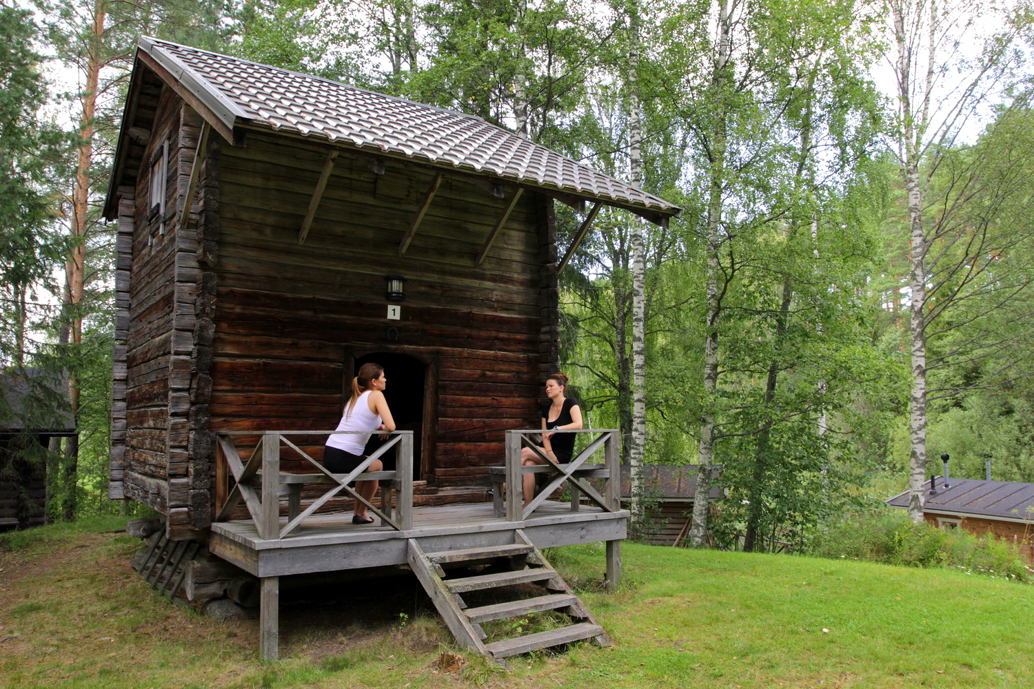 Kapeenkosken aittakylä Äänekoskella